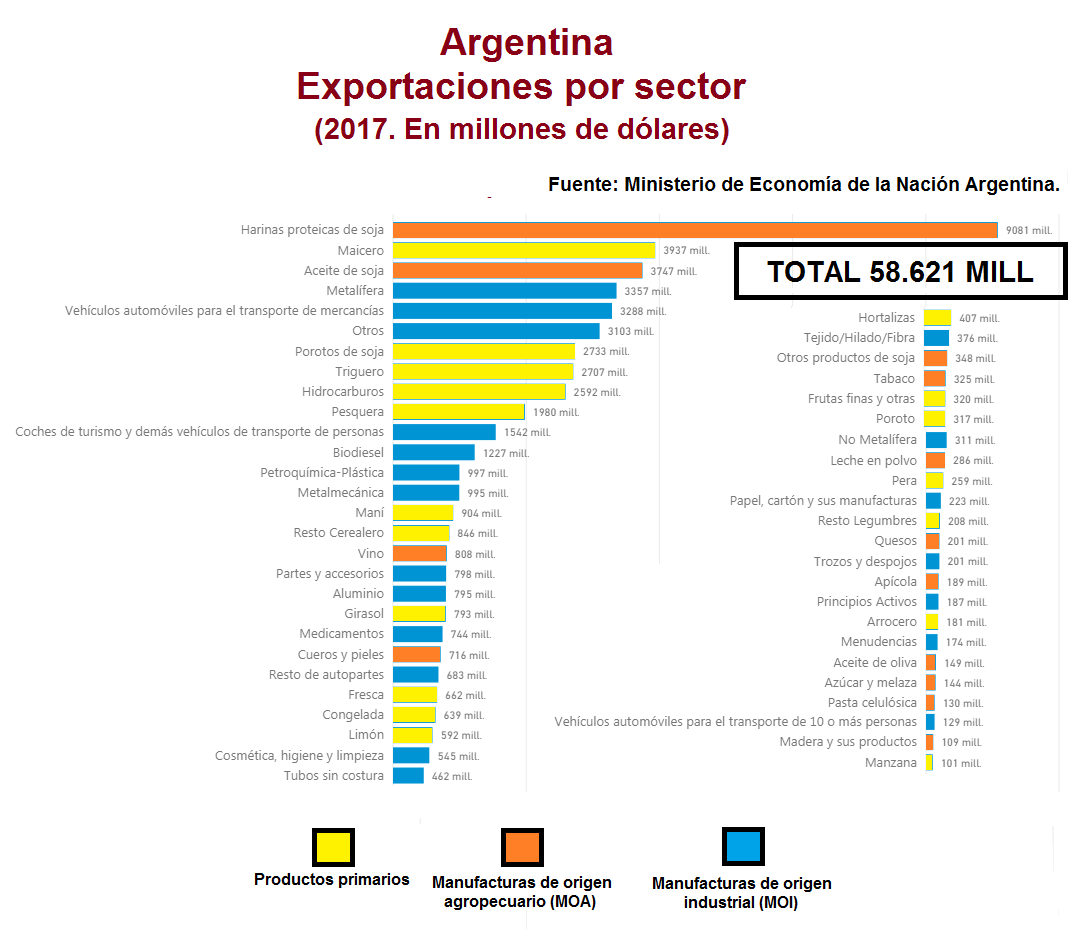 Argentina. Exportaciones por sector. 2017. Fuente. Ministerio de Economía de la Nación Argentina. Exportaciones Estructural 2010-2017